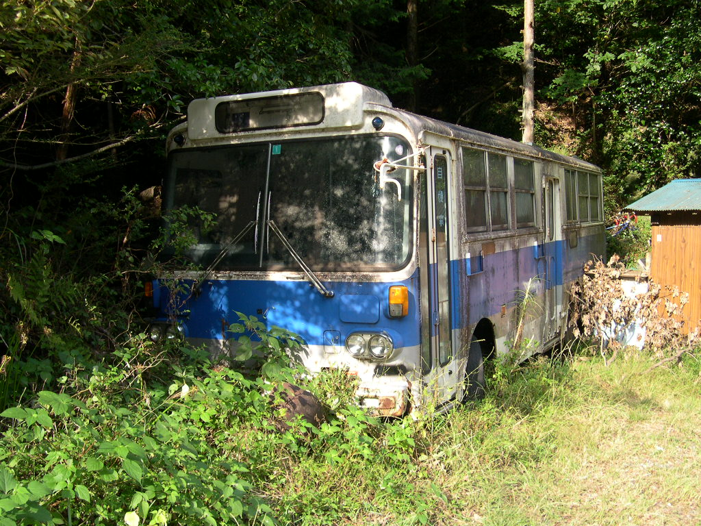 四国にて撮影した、JR四国バス